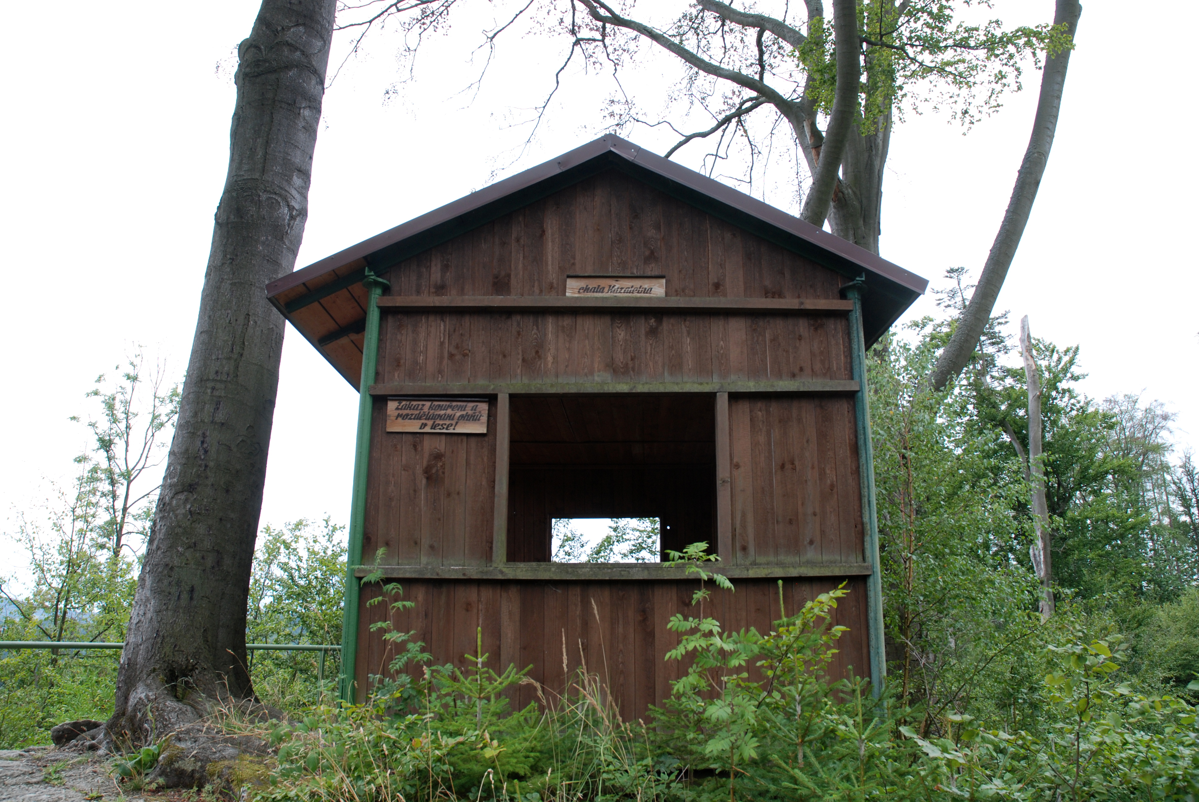 Chata Kazatelna v karlovarských lázeňských lesích